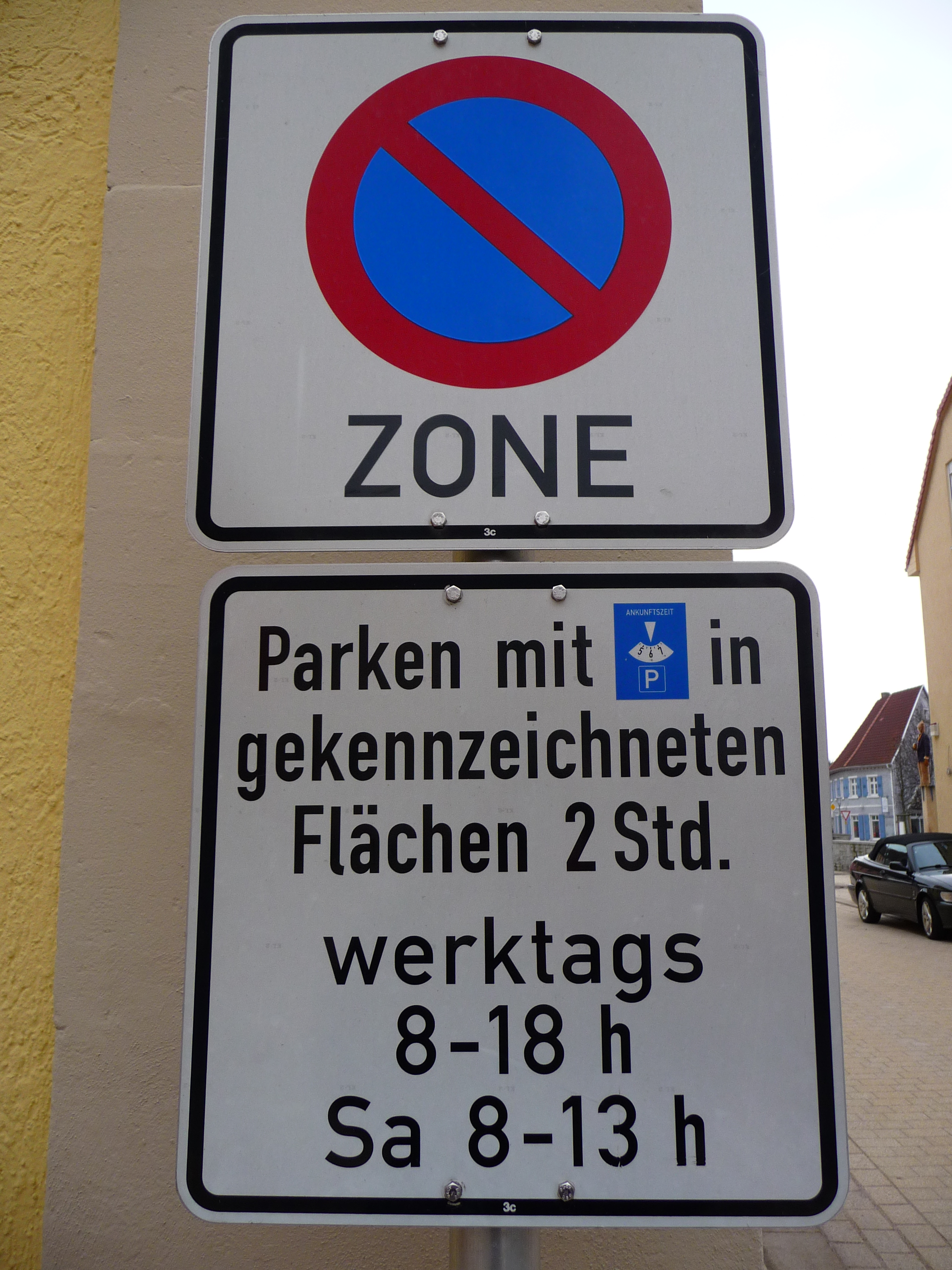 Verkehrsschilder "Zeichen 286 StVO, Eingeschränktes Haltverbot" und "1040-33: Parken mit Parkscheibe in gekennzeichneten Flächen 2 Stunden" und Hinweis auf zeitliche Beschränkung